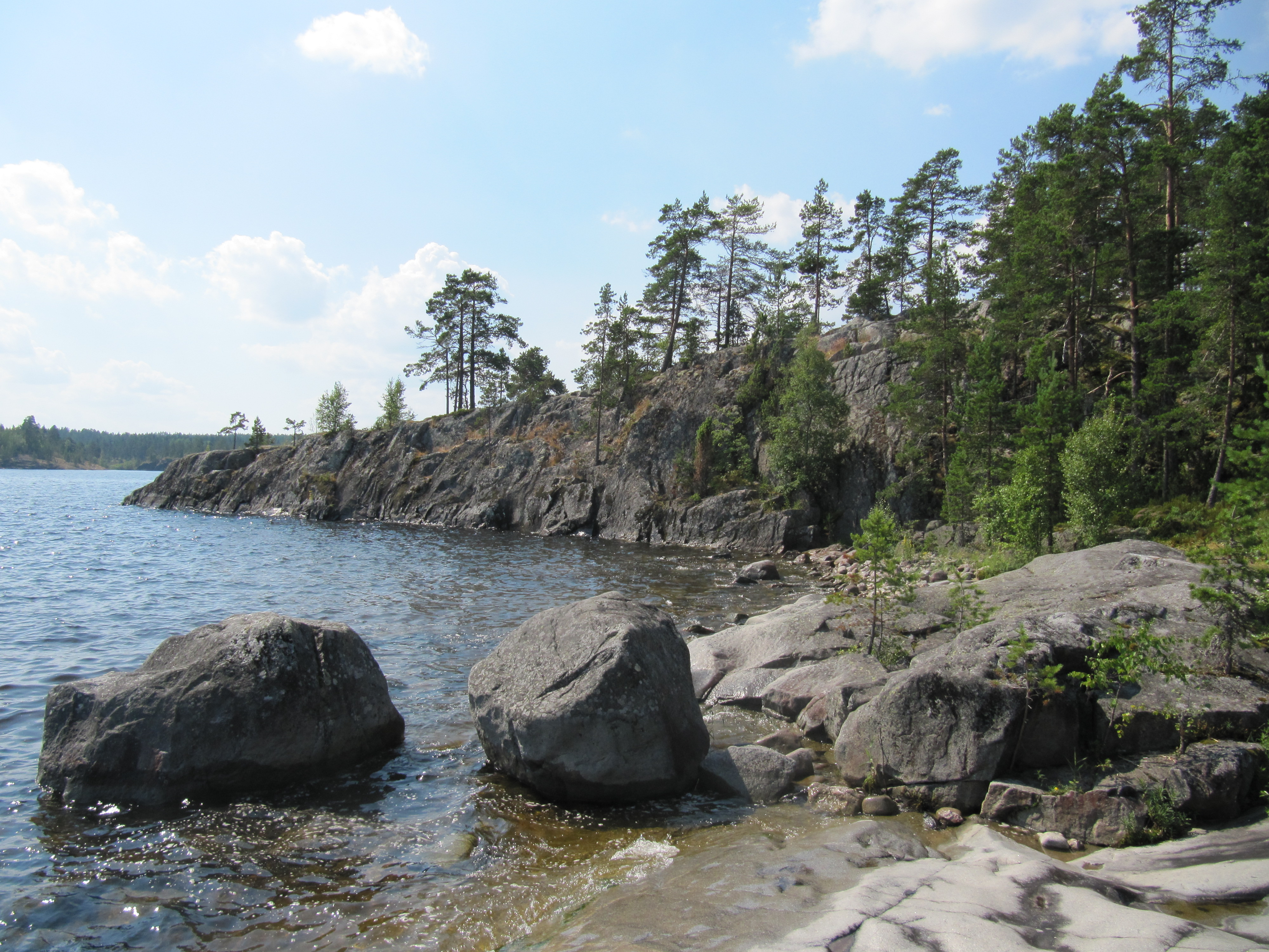 Остров Койонсаари